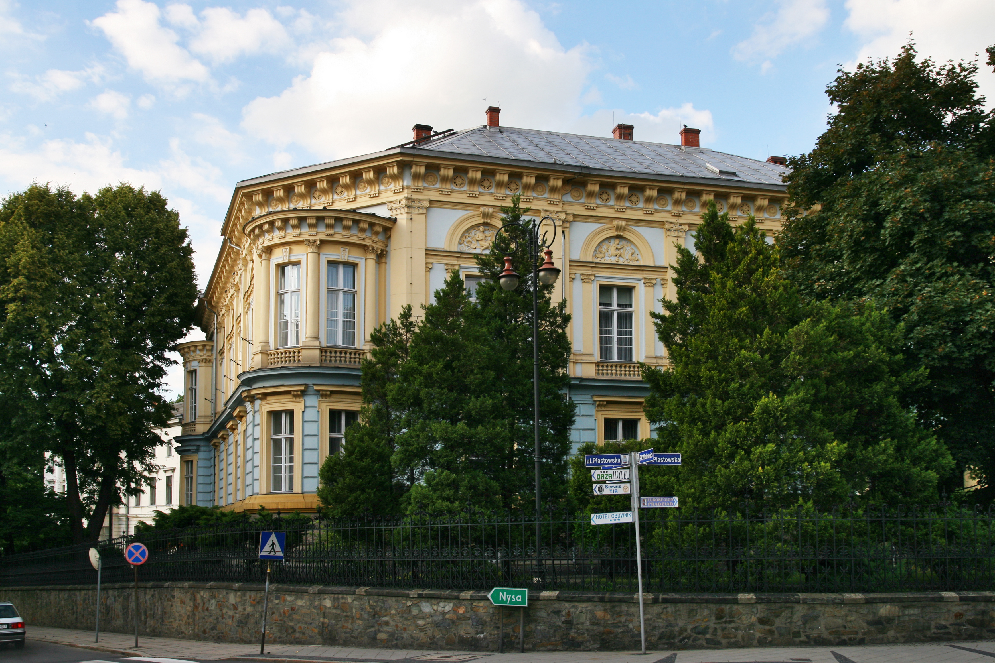 Prudnik, Zespół liceum medycznego, 1873 11.1978.